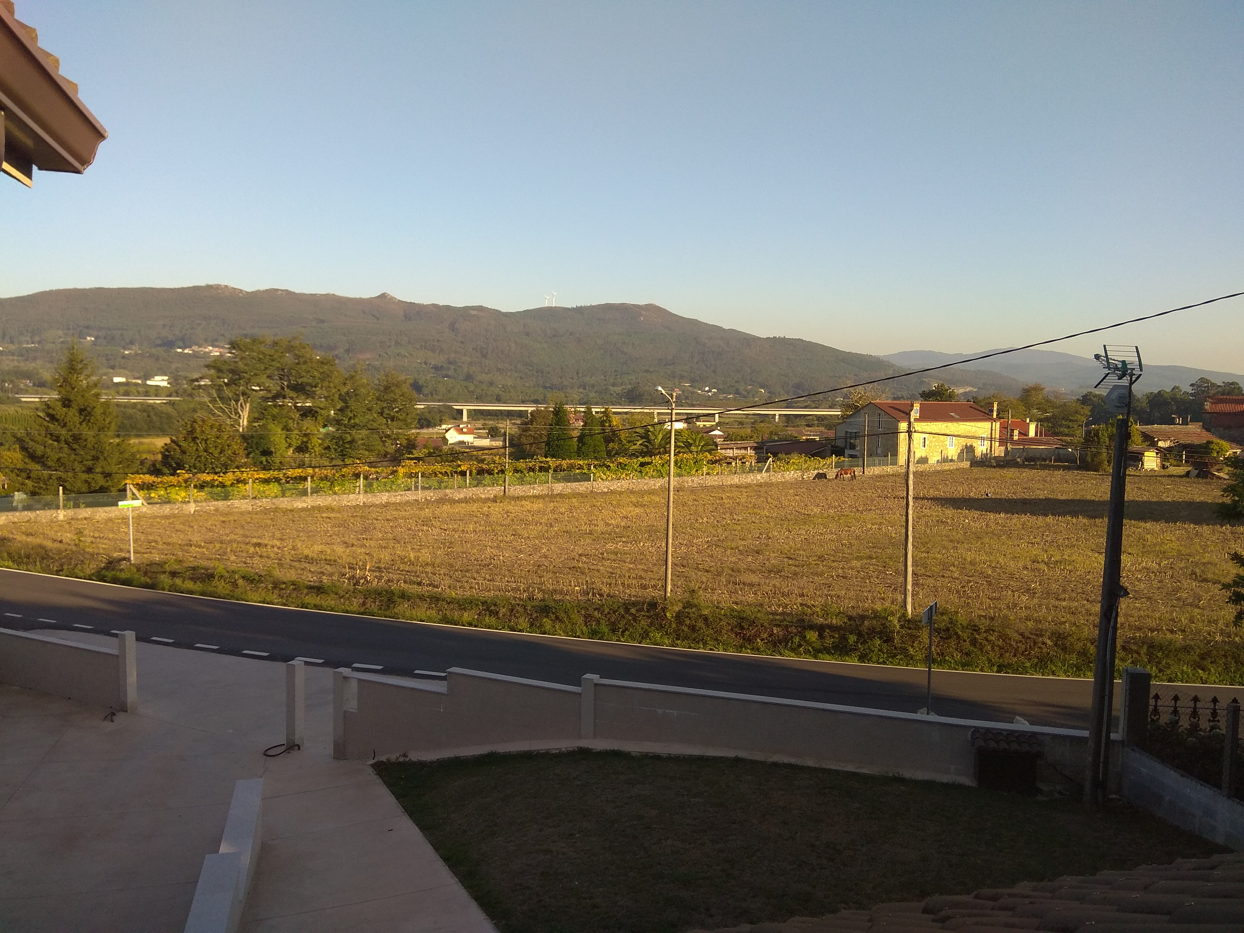 panoramica seira